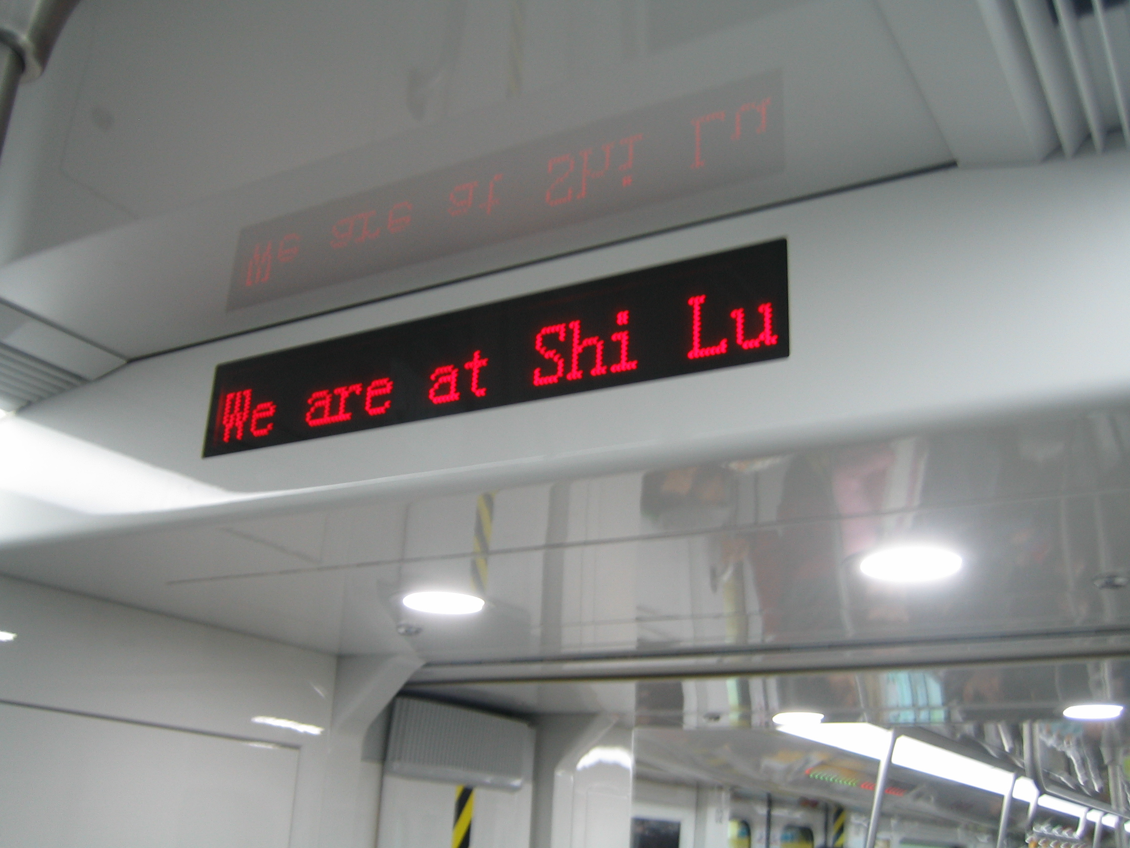 中文（中国大陆）: 苏州地铁2号线列车上的电子显示屏